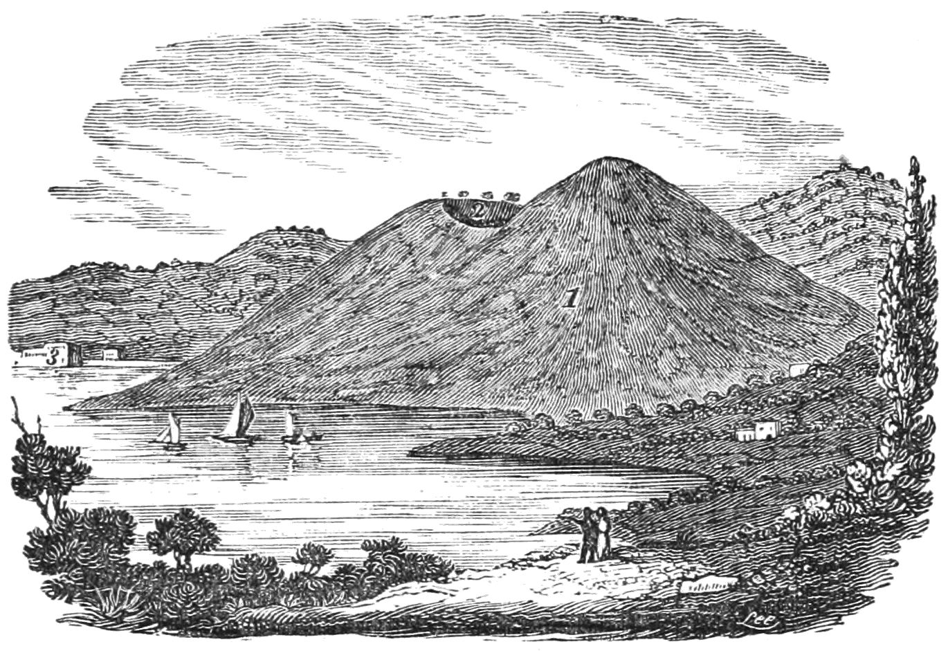 Monte Nuovo